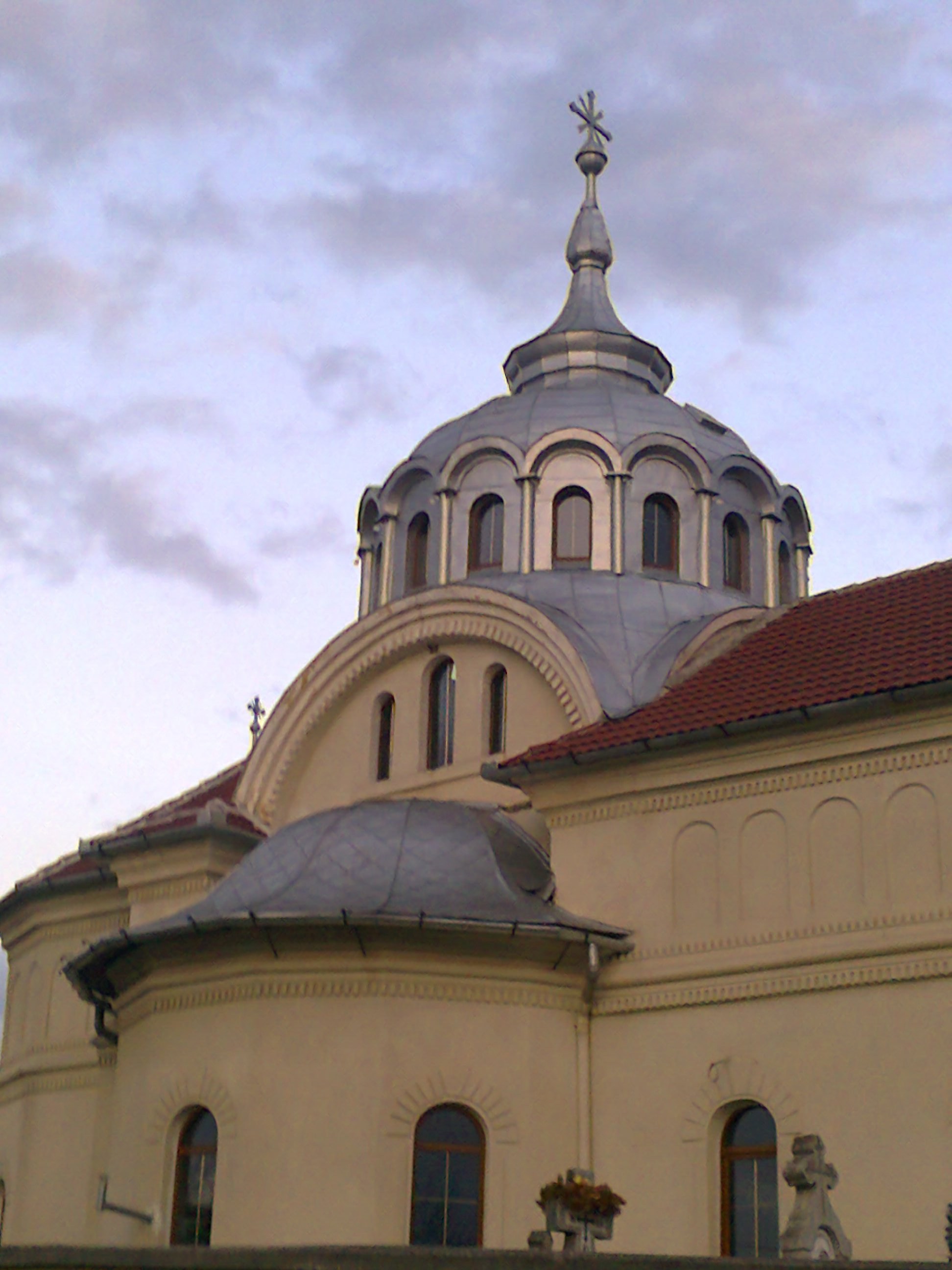 Biserica "Sf. Apostoli Petru și Pavel" din Sebeşu de Sus, construita in 1760 si extinsa in 1909. Monument catalogat cu cod LMI SB-II-m-B-12544